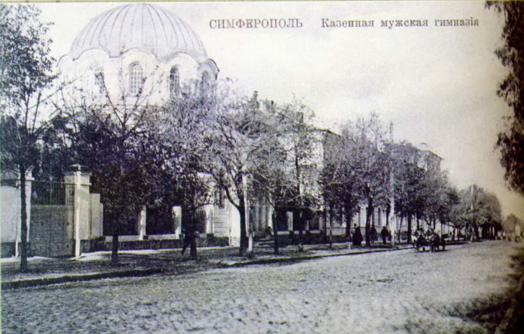 Церковь казенной мужской гимназии, Симферополь